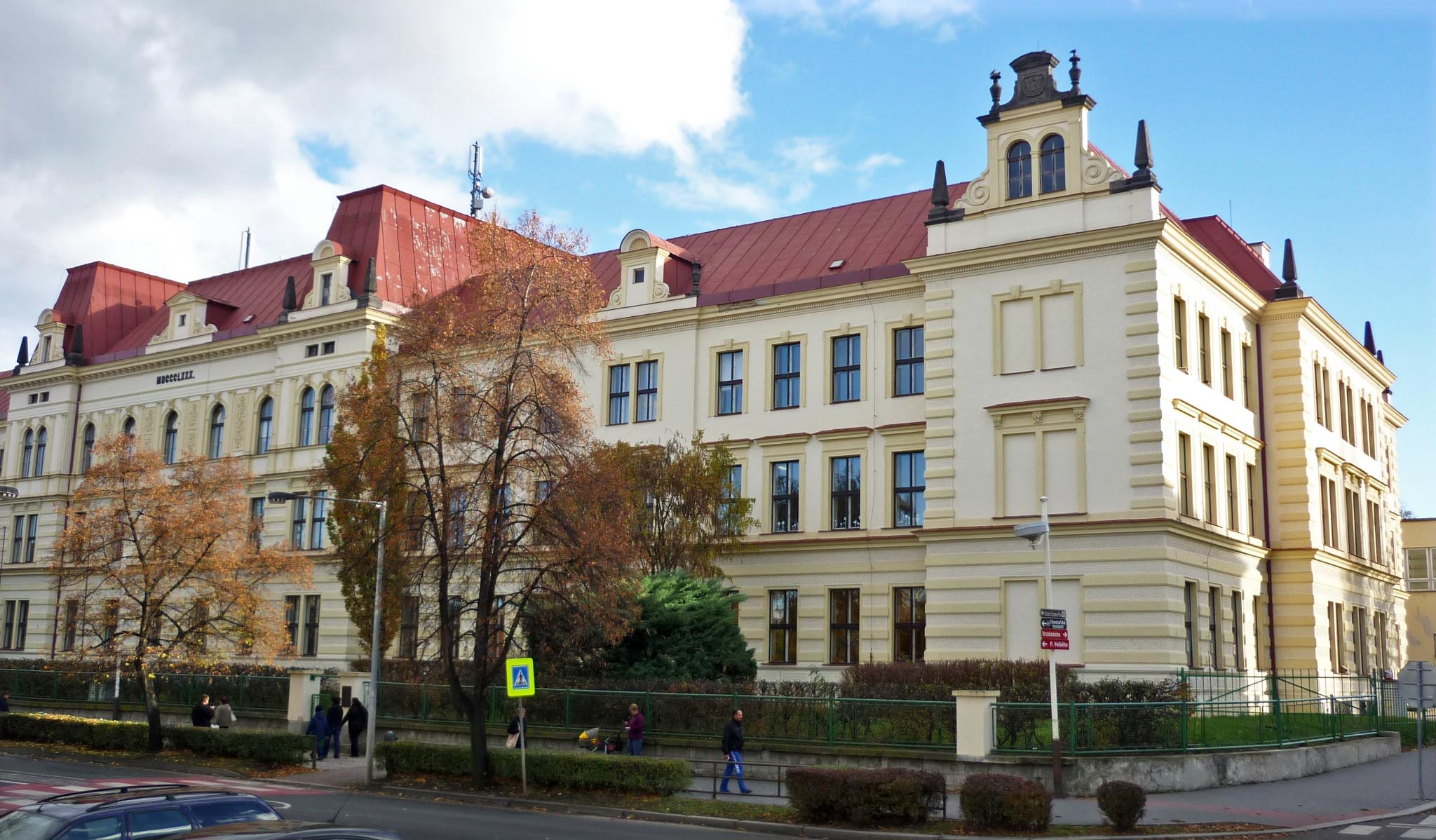 Bürgerschule in Saaz/Žatec